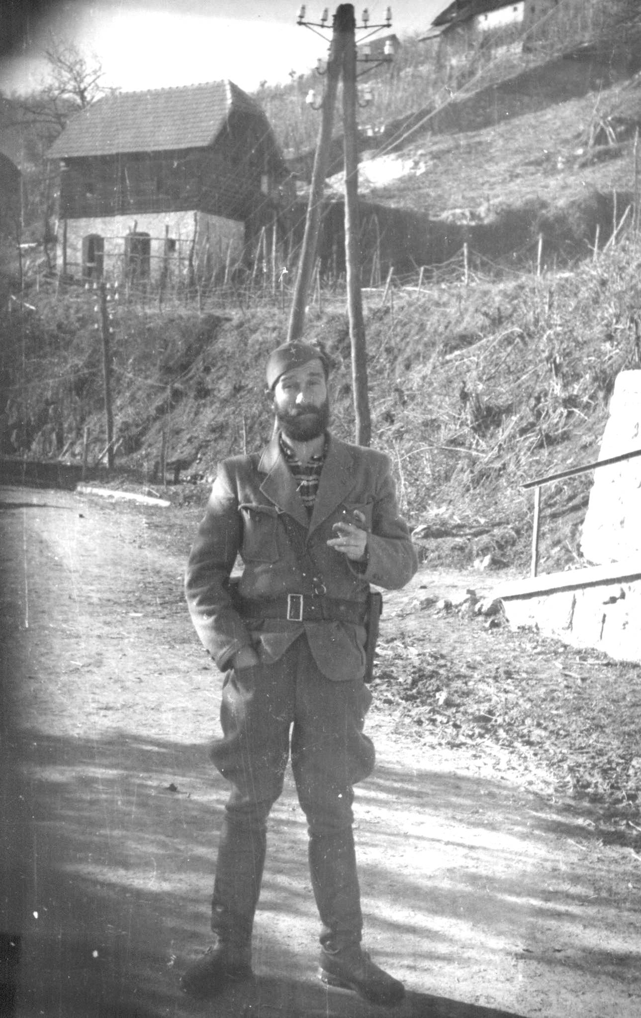 Srpskohrvatski / српскохрватски: Vlado Zečević, većnik AVNOJ-a, u Sloveniji 1944.